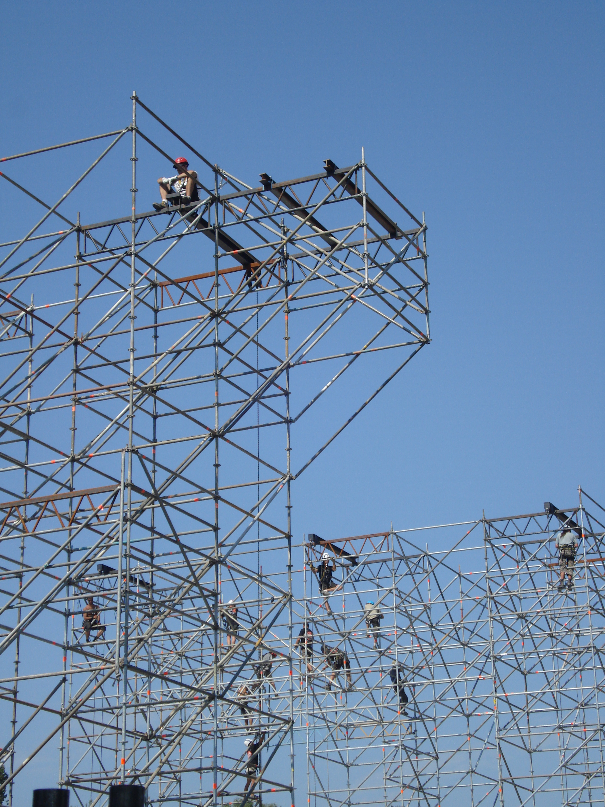 Montage de la scène du festival Musilac (Aix-les-Bains) en 2009.